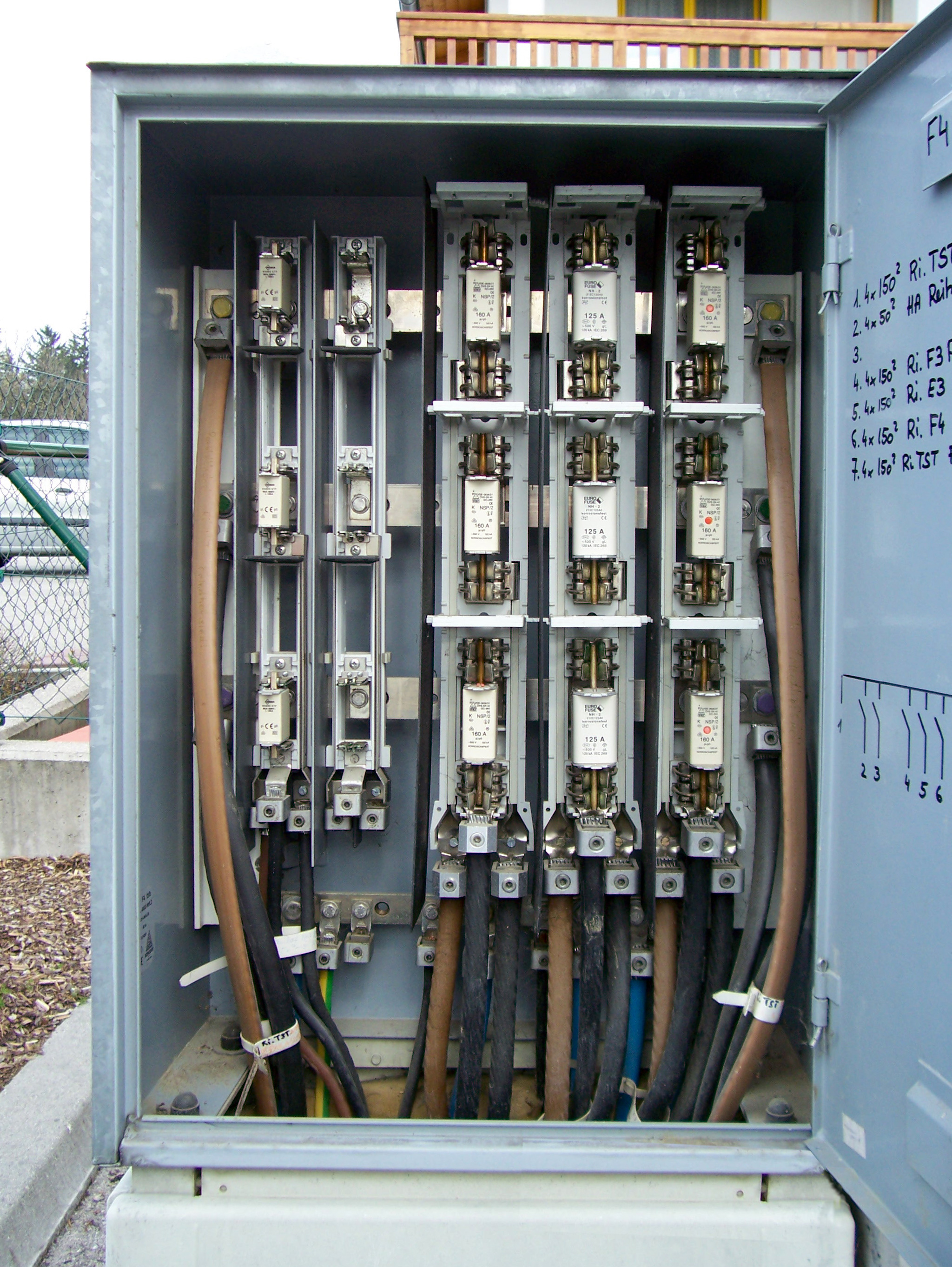 Straßenverteilung in der öffentlichen Stromversorgung (EVN, Österreich), Sicherungsverteiler Niederspannung 0,4 kV (Hauptverteilung mit NH-Sicherungen, Niederspannungs-Hochleistungs-Sicherungen) Kamera: Kodak C663 Danksagung: Unter freundlicher Mitwirkung und Unterstützung der: EVN AG, EVN Platz, 2344 Maria Enzersdorf, Hr. E. Jungwirth & Hr. Mag. S. Zach